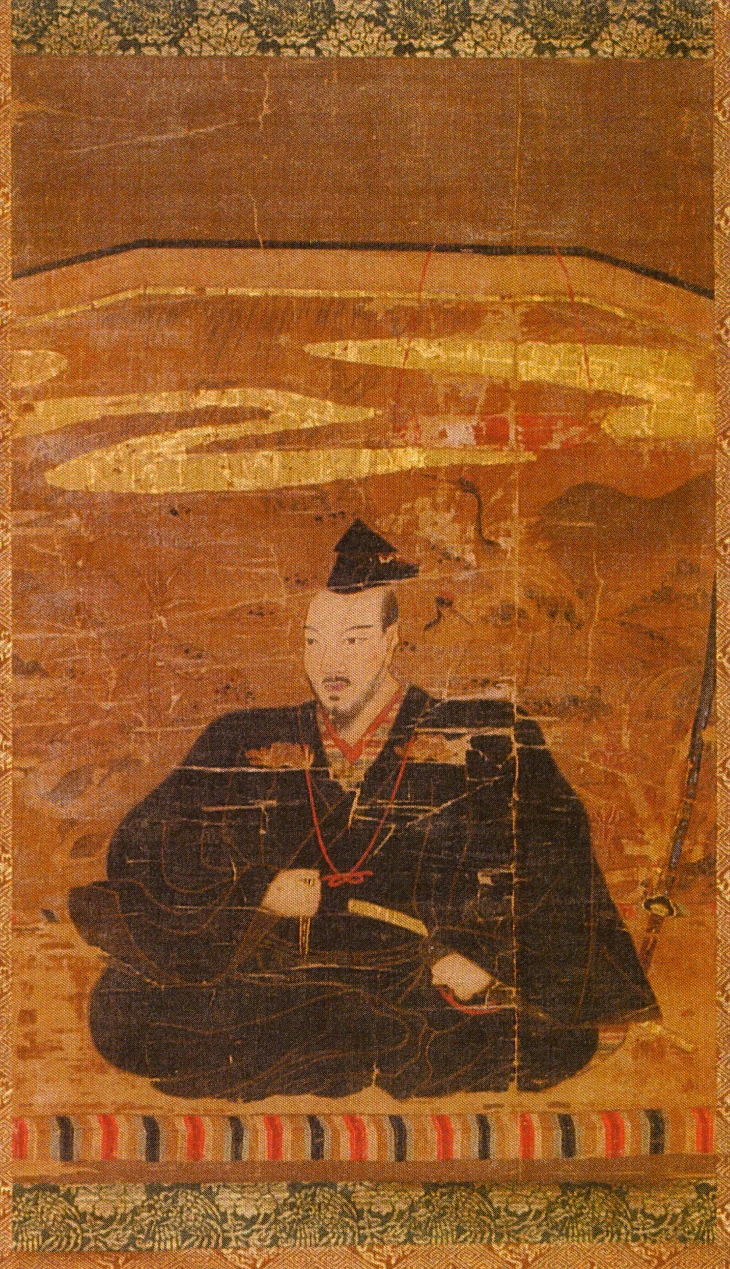 宗義調の肖像。